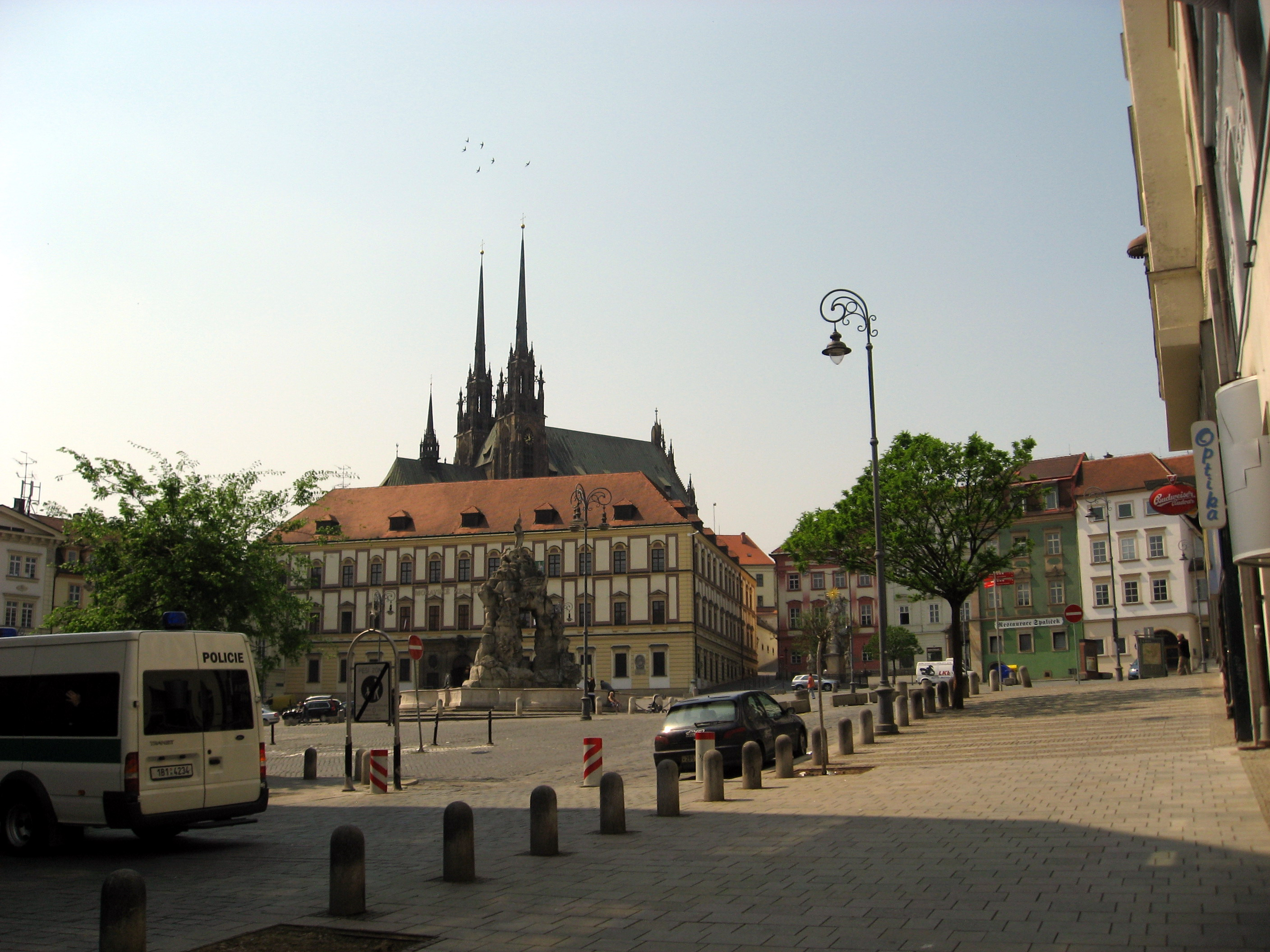 První máj 2009 v Brně, liduprázdné město v důsledku policejních opatření, při kterých Policie ČR blokovala lidem vstup do centra města či je podrobovala osobním prohlídkám a zapisovala si jejich osobní údaje